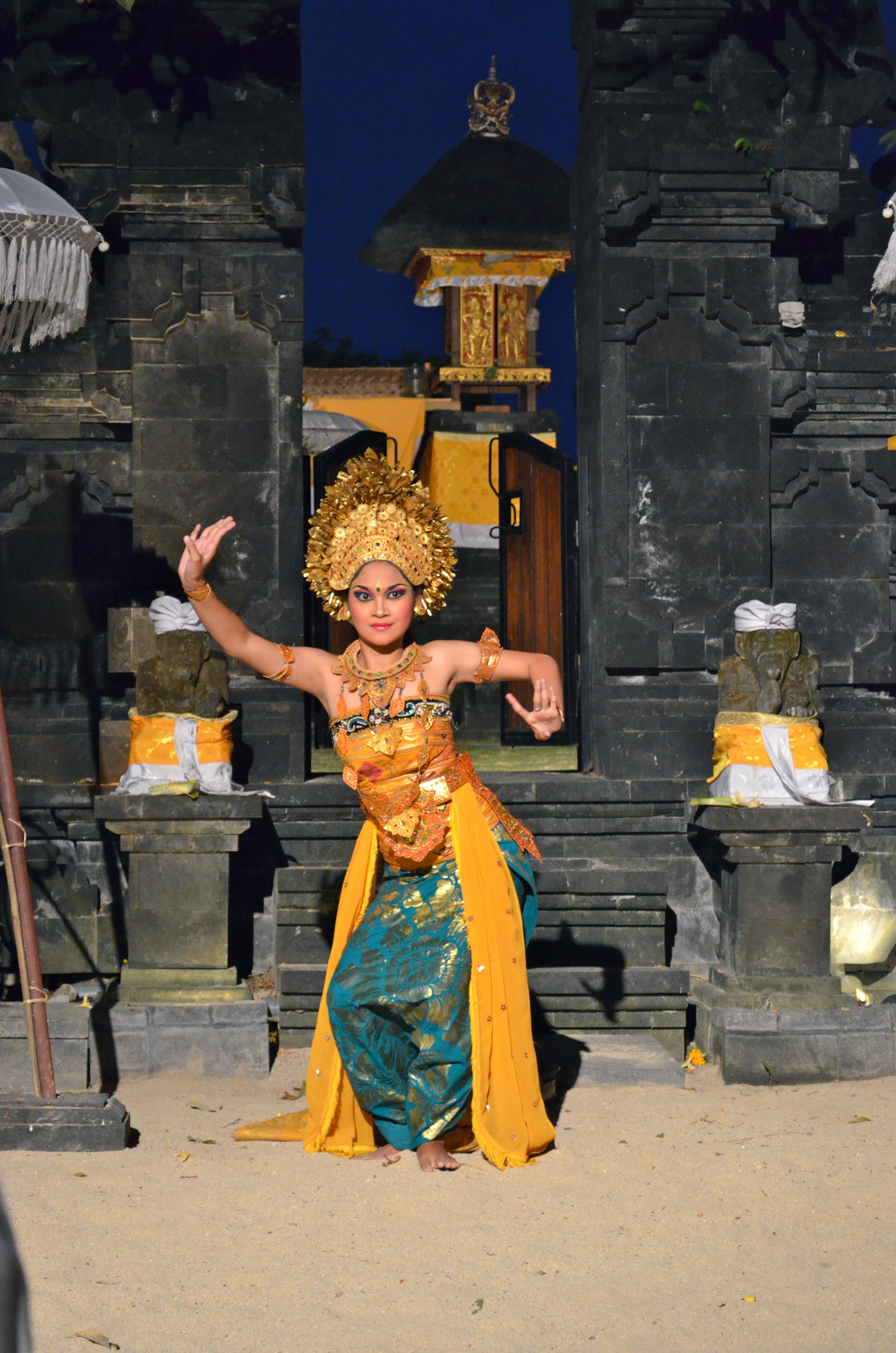 Bali Hindu ritual dance